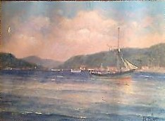 Aquarelle de Charles Curtelin représentant un bâteau sur l'étang